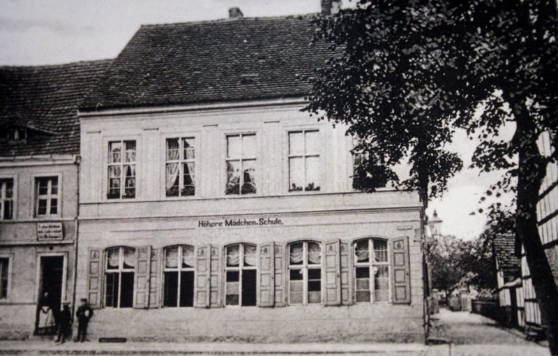 Wyższa Szkoła Żeńska w Gryficach (wówczas Greifenberg/Pommern)